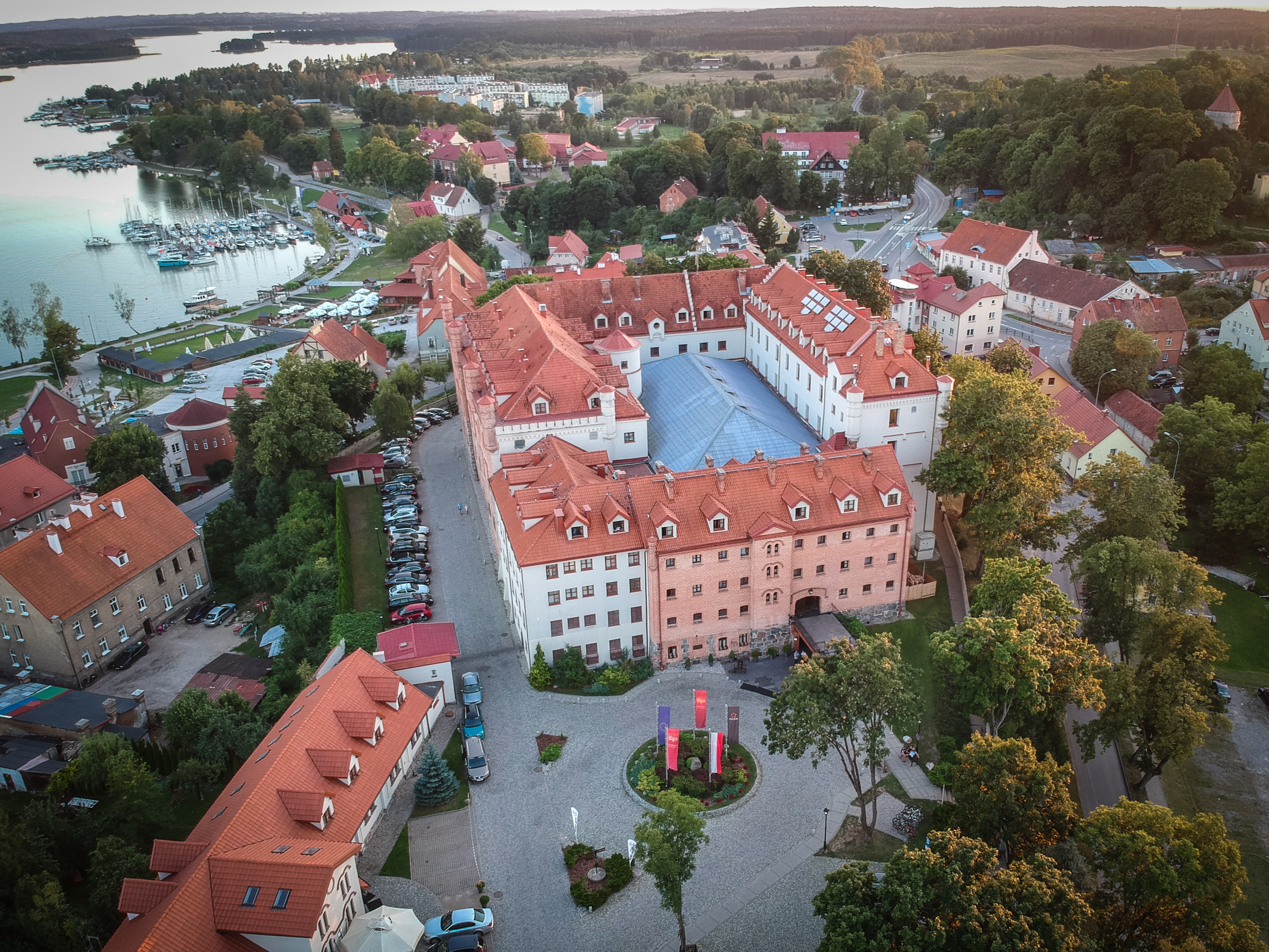 Ryn, Zamek w Rynie Wikidata has entry Q1095347 with data related to this item.